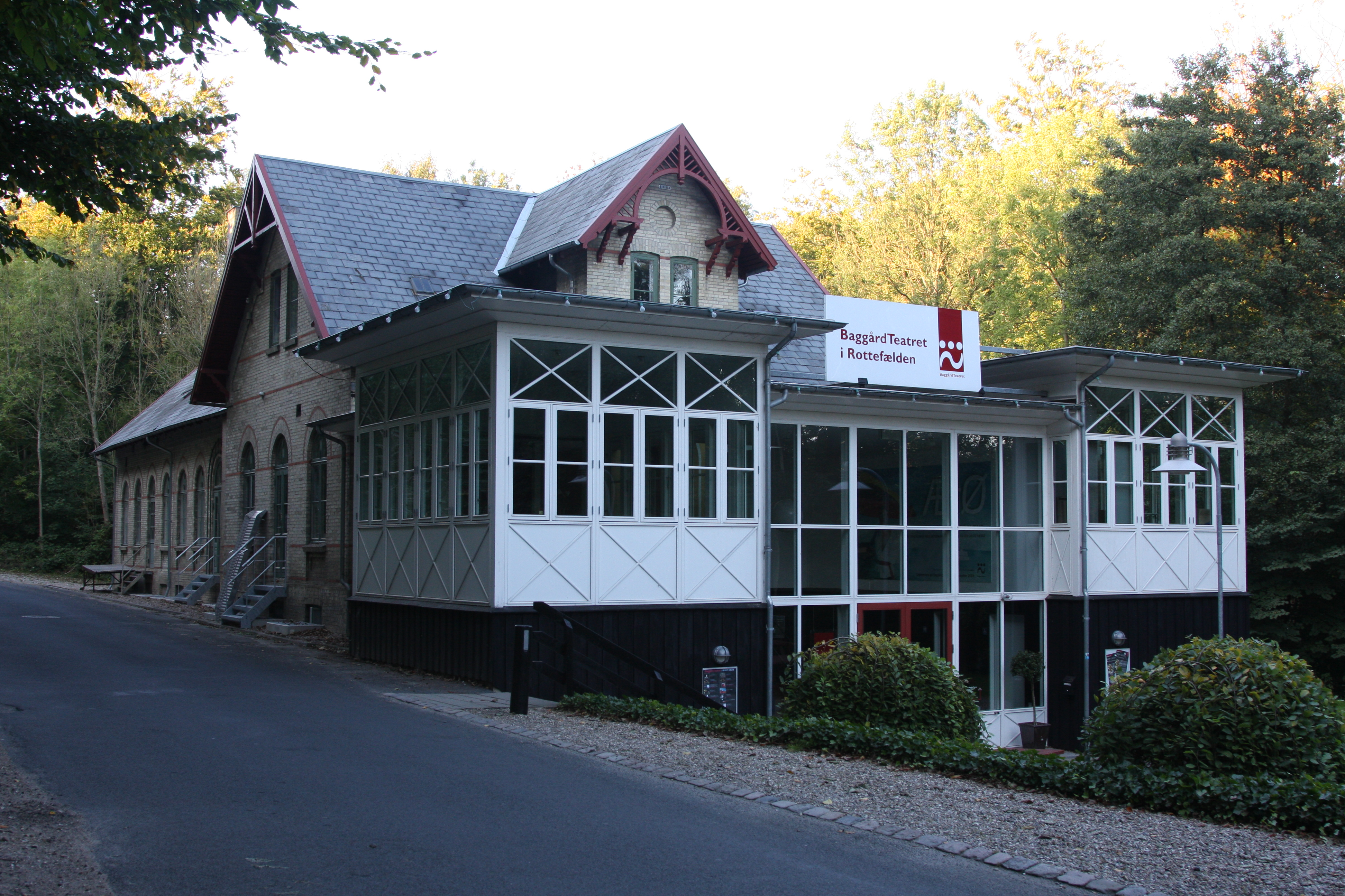 The Rottefælden Theatre in Svendborg